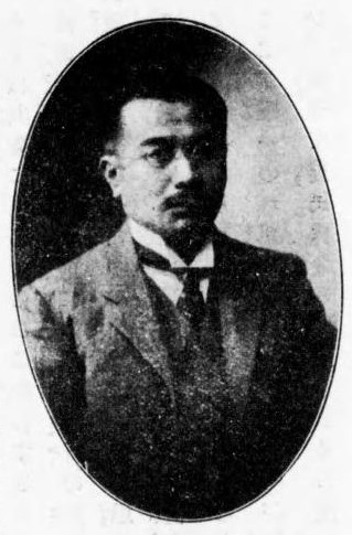 五十嵐敬止（1860～1931）